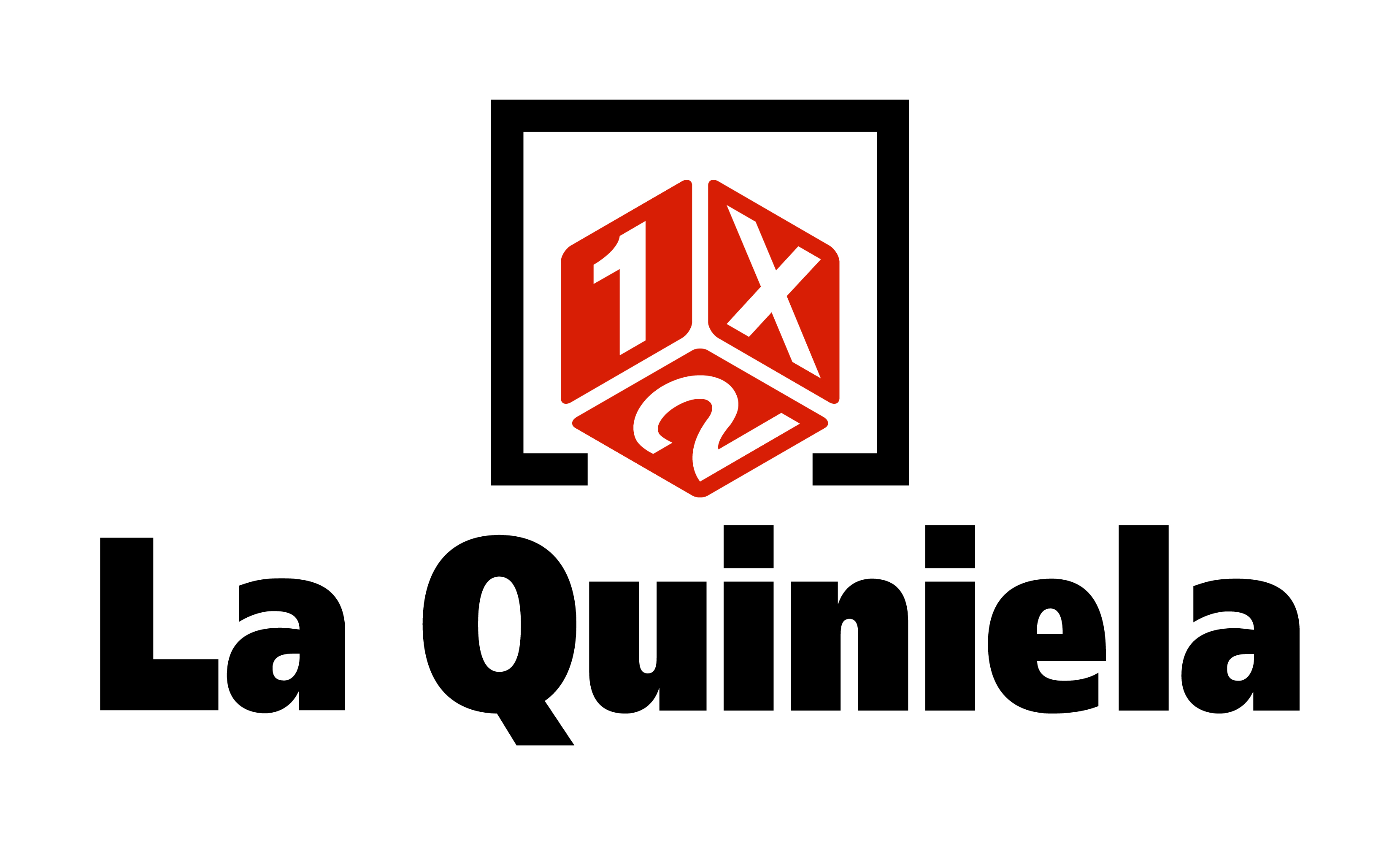 Logotipo de la Quiniela, concurso de Loterías y Apuestas del Estado de España